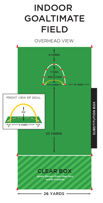 Goaltimate outdoor field setup